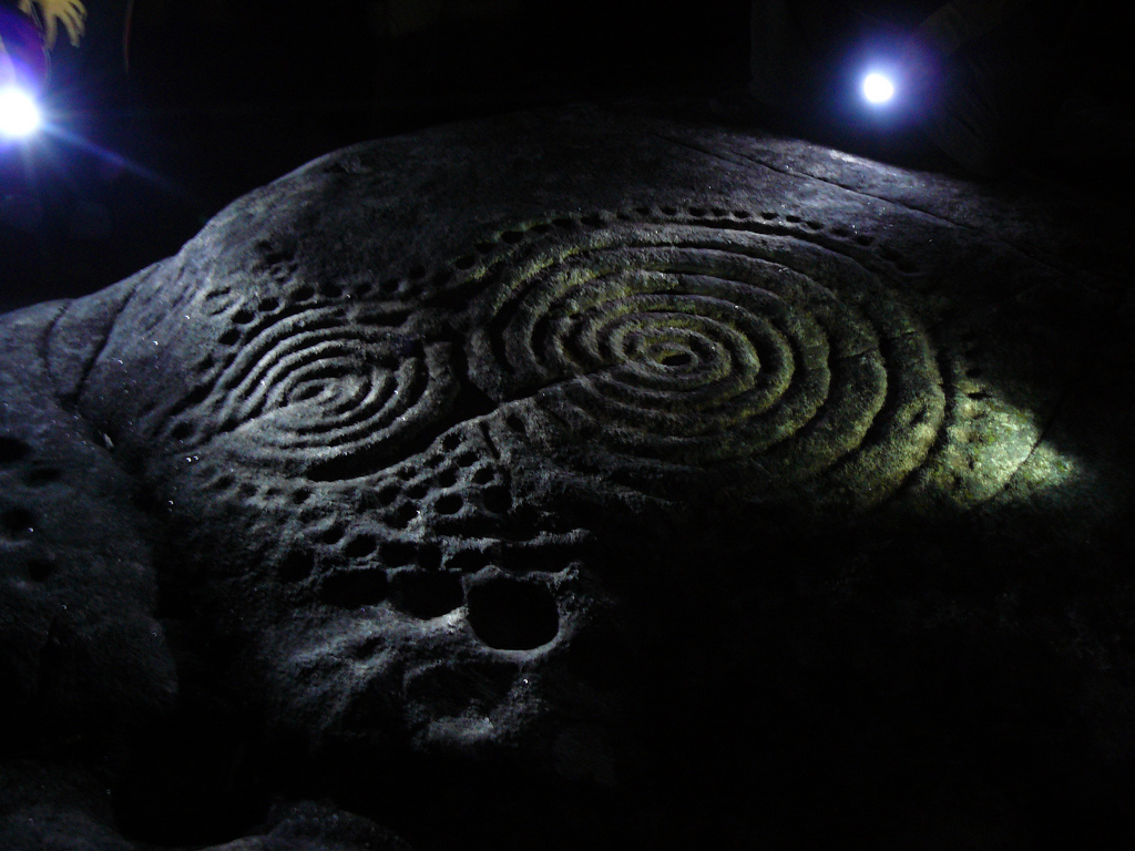 Sobre espiral da Laxe das Rodas - Louro - Muros - A Coruña